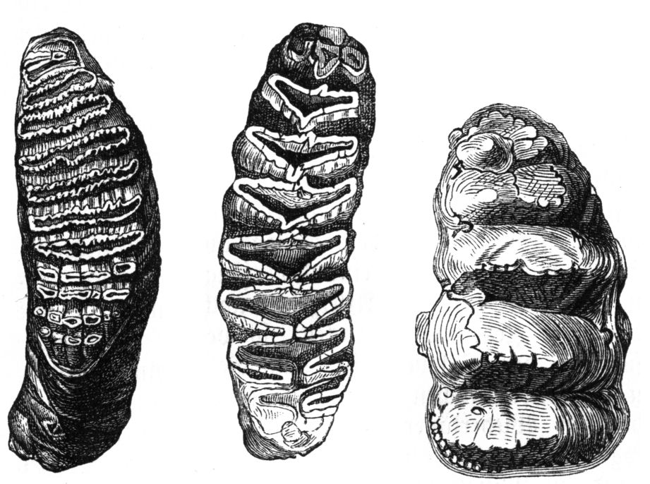 Original caption: "Fig. 87. Vorletzter, unterer Backenzahn des asiatischen Elephanten, Elephas asiaticus, von oben gesehen; in 1/4 der natürlichen Gr. Fig. 88 Vorletzter, unterer Backenzahn des afrikanischen Elephanten, Elephas africanus, von oben gesehen; in 1/4 der natürlichen Gr. Fig. 89. Letzter, unterer Backenzahn von Mastodon ginganteum, von oben gesehen; in 1/4 der natürlichen Gr." Translation (partly): "Fig. 87. Penultimate, lower molar of an asian elephant, Elephas asiaticus, as seen from above; 1/4 natural size Fig. 88 Penultimate, lower molar of an african elephant, Elephas africanus, as seen from above; 1/4 natural size Fig. 89. Penultimate, lower molar of a Mastodon giganteum, as seen from above; 1/4 natural size" Size: 3.1 x 2.3 in² (7.8 x 5.8 cm²)